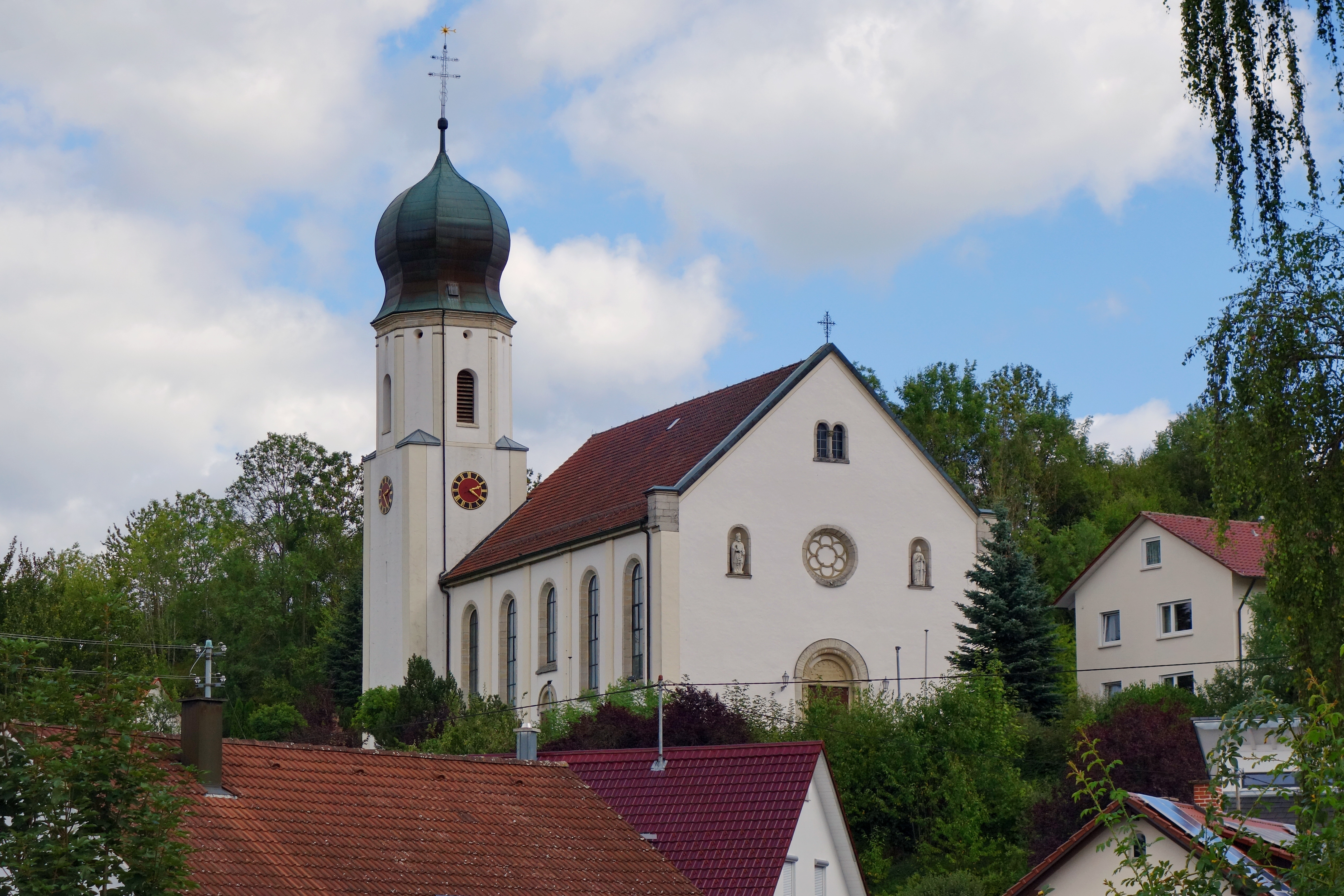 Katholische Pfarrkirche St. Hyppolit und Kassian Frittlingen, Kirchberg 5